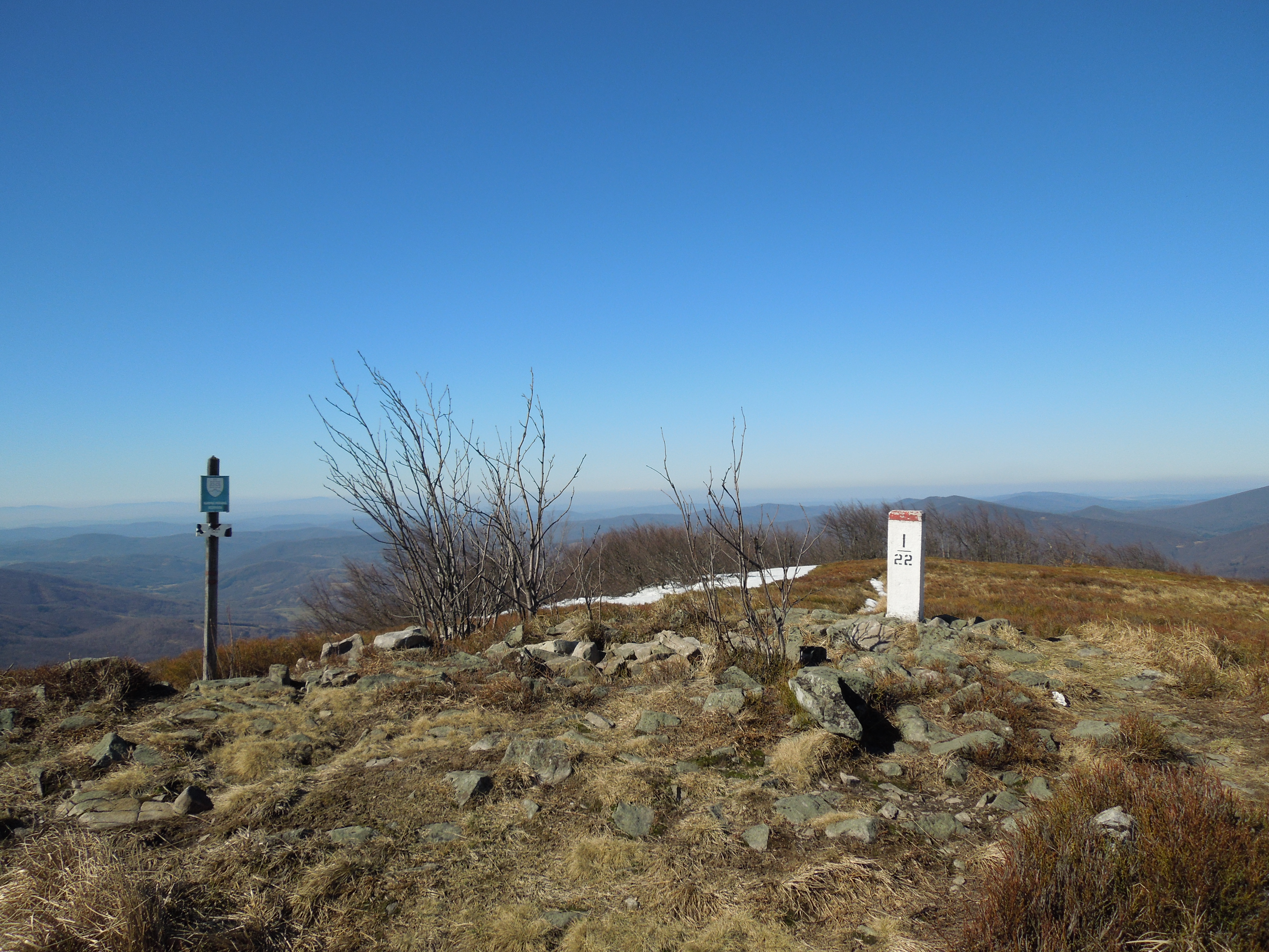 Vrchol Pľaše